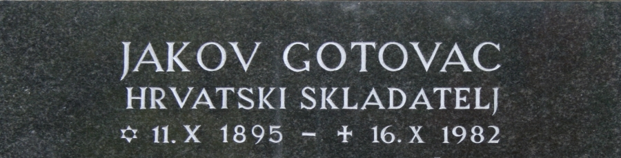 Grob Jakova Gotovca na zagrebačkom Mirogoju